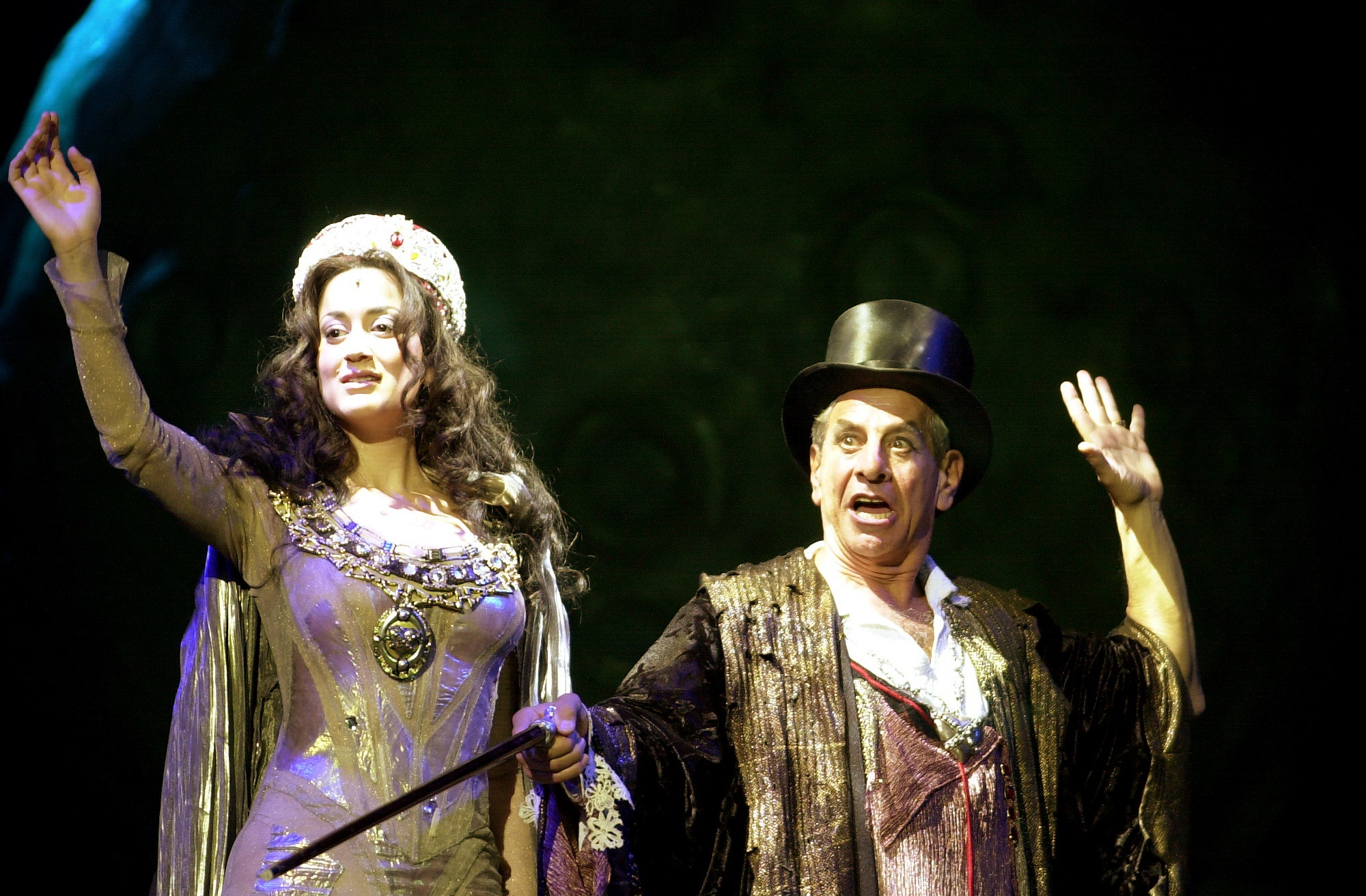 ההצגה השטן במוסקבה בתיאטרון גשר